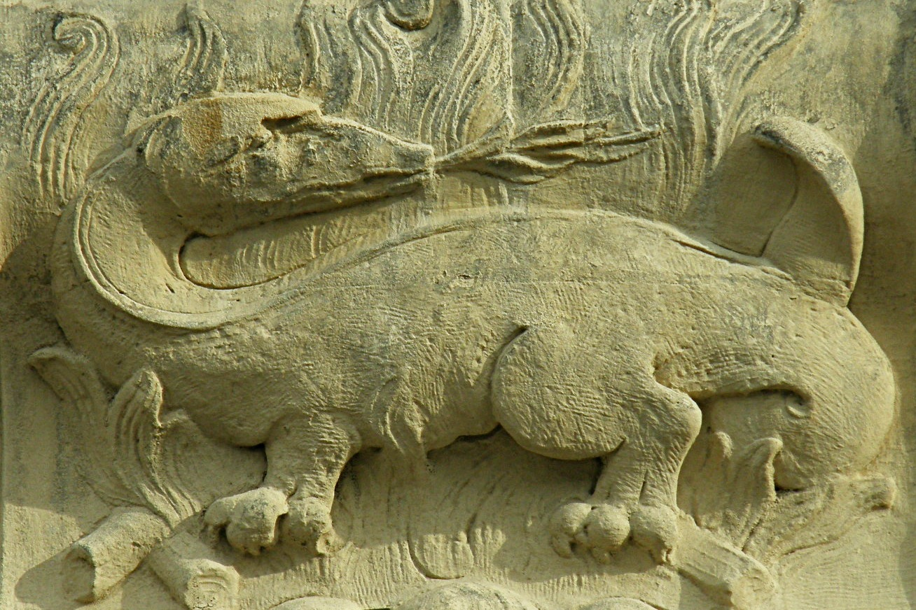 Arras (Pas-de-Calais, France). Détail d'une façade de la Place des Héros. .